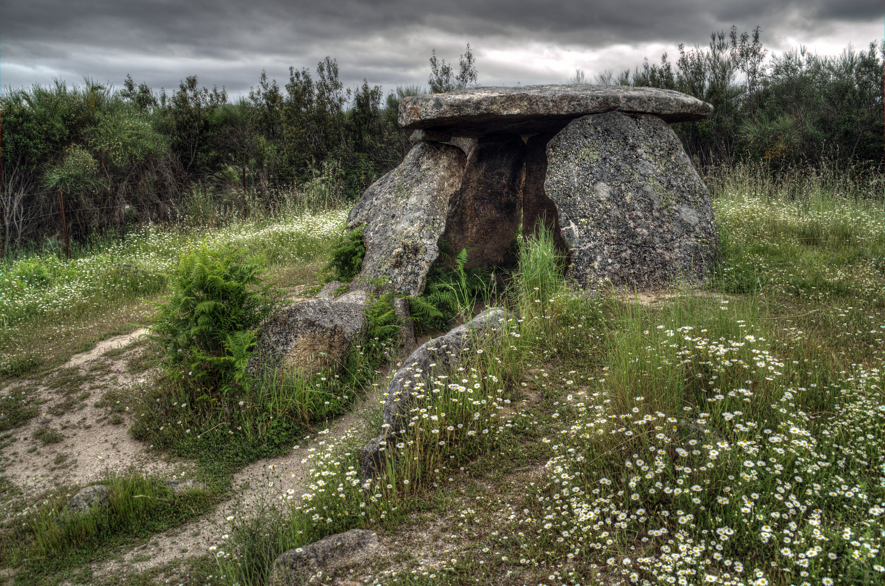 Dolmen de granito con una cámara de 2.7 x 3.0 m y un corredor corto. Cronología: IV-III milenio a.C. Situado en las cercanías de La Aceña de la Borrega, Cáceres.